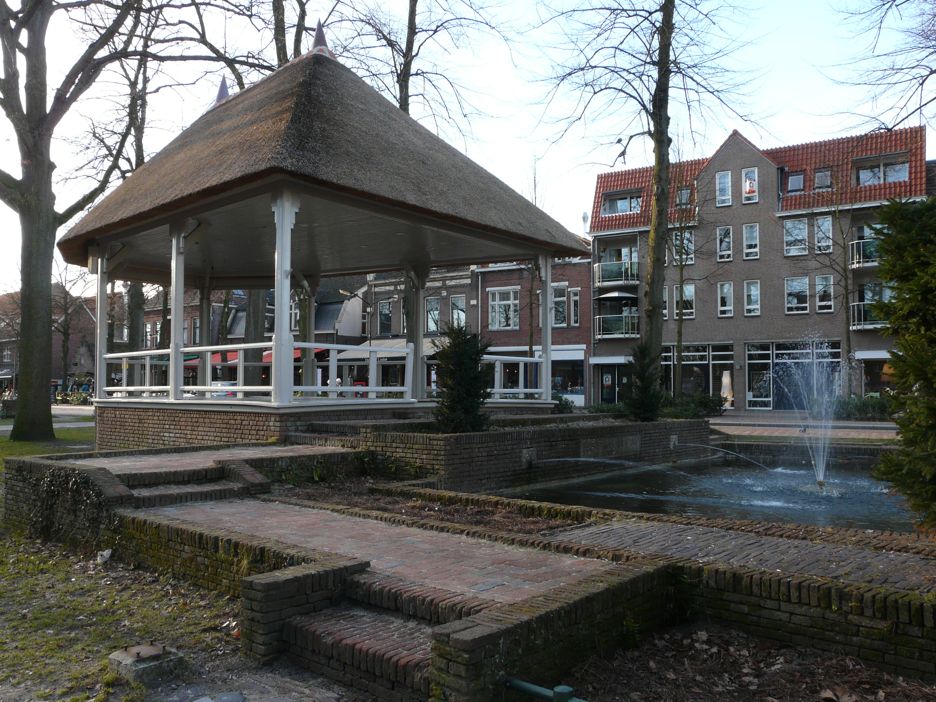 Oisterwijk